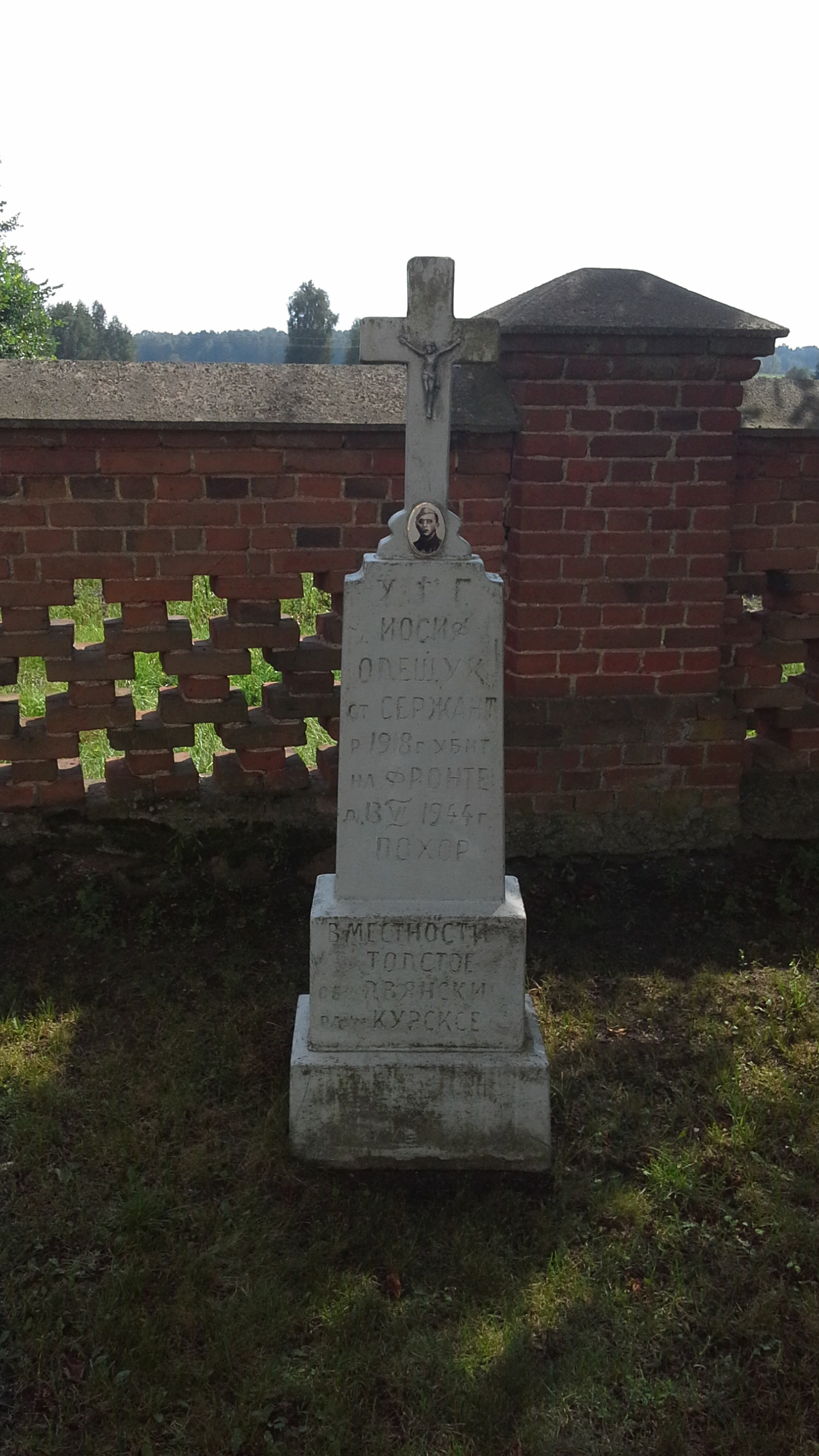 Symboliczny nagrobek poległego podczas II wojny światowej mieszkańca Czarnej Cerkiewnej przy cerkwi w tejże miejscowości